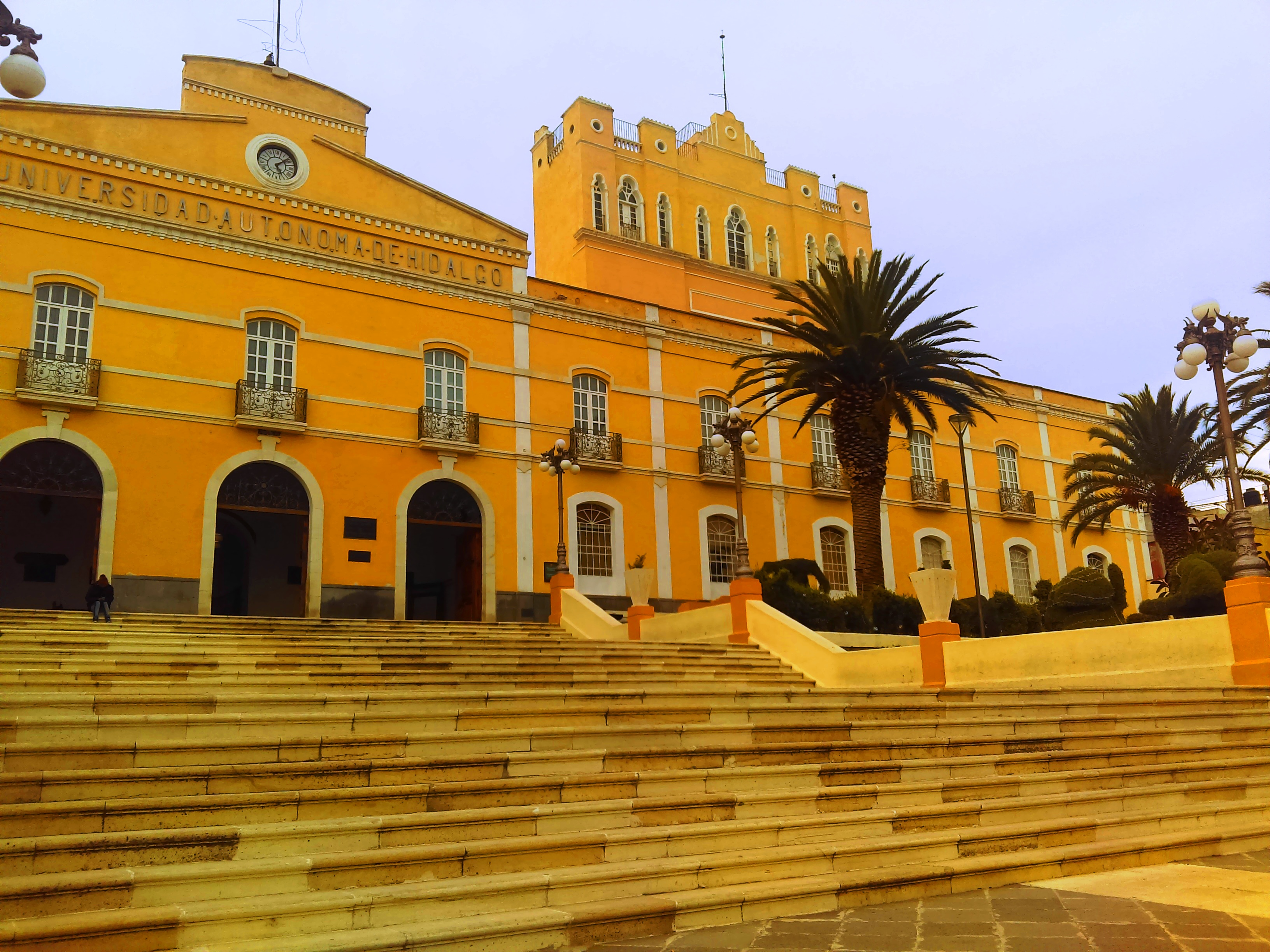 Edificio central UAEH, Pachuca.